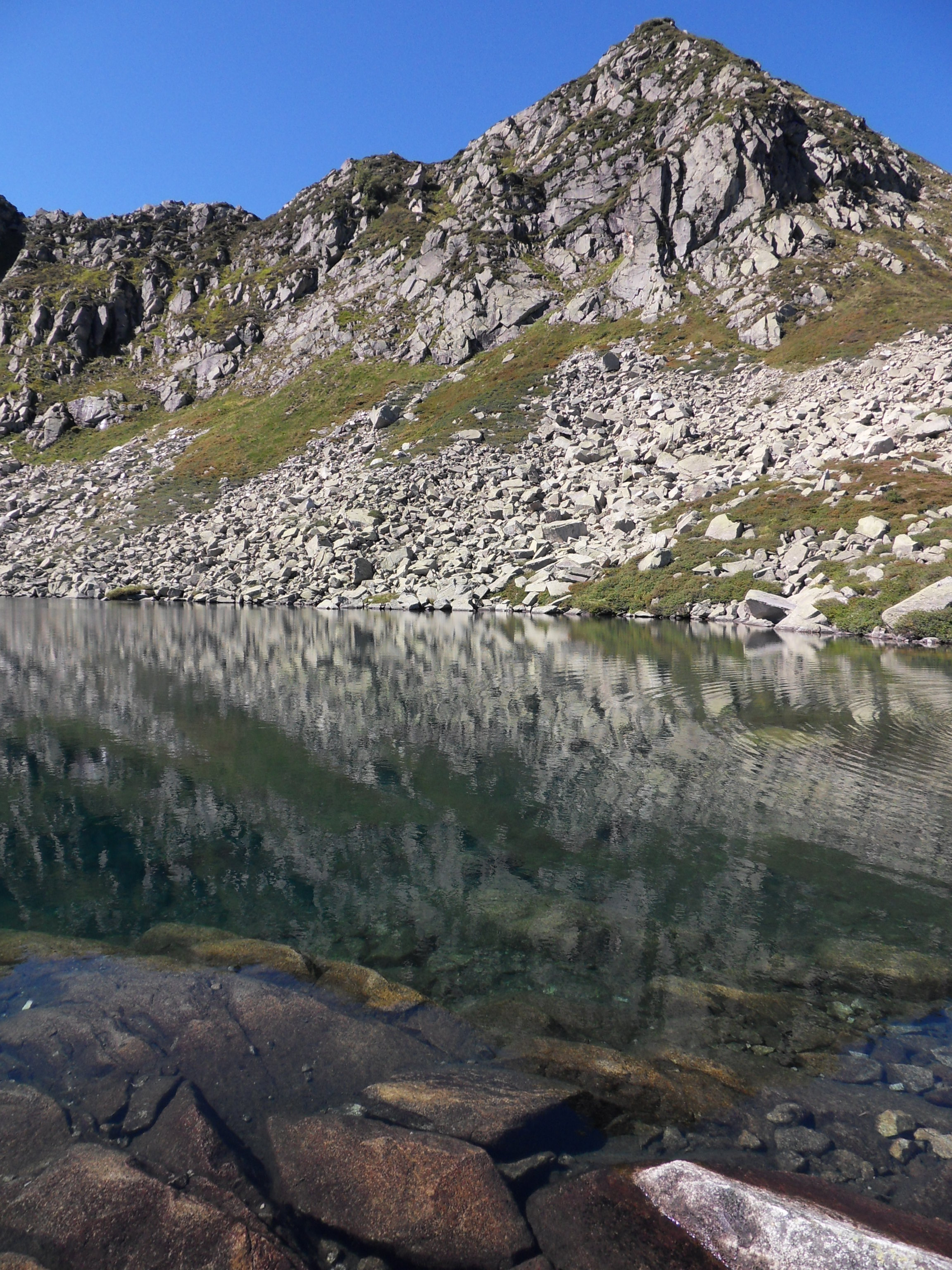 L'étang d'Alate (1868 m), au pied du mont Garias (2006 m), en Ariège, vallée de Vicdessos, région Midi-Pyrénées. Prise de vue le 19 septembre 2010.